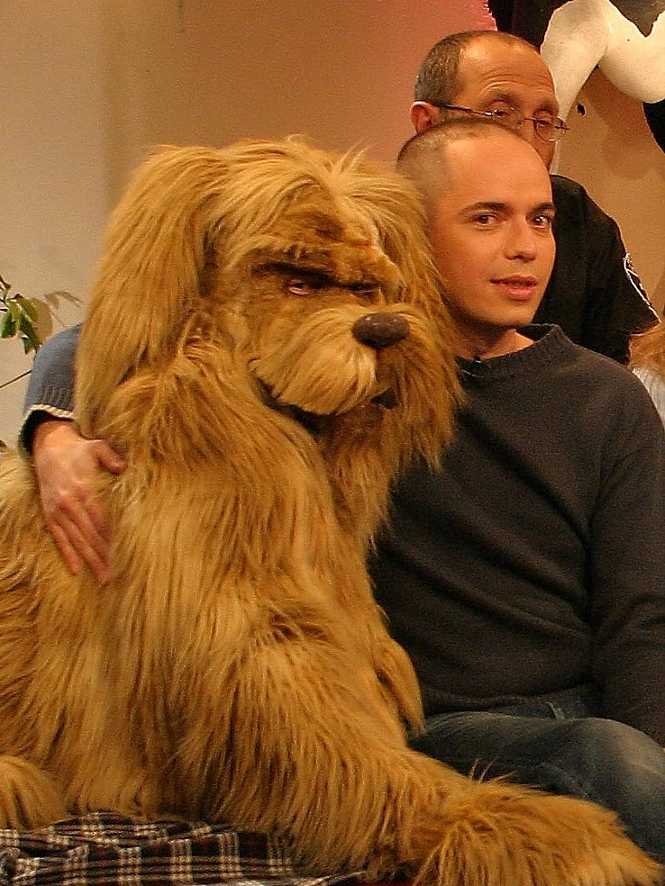 טל ברמן באולפן ביפ